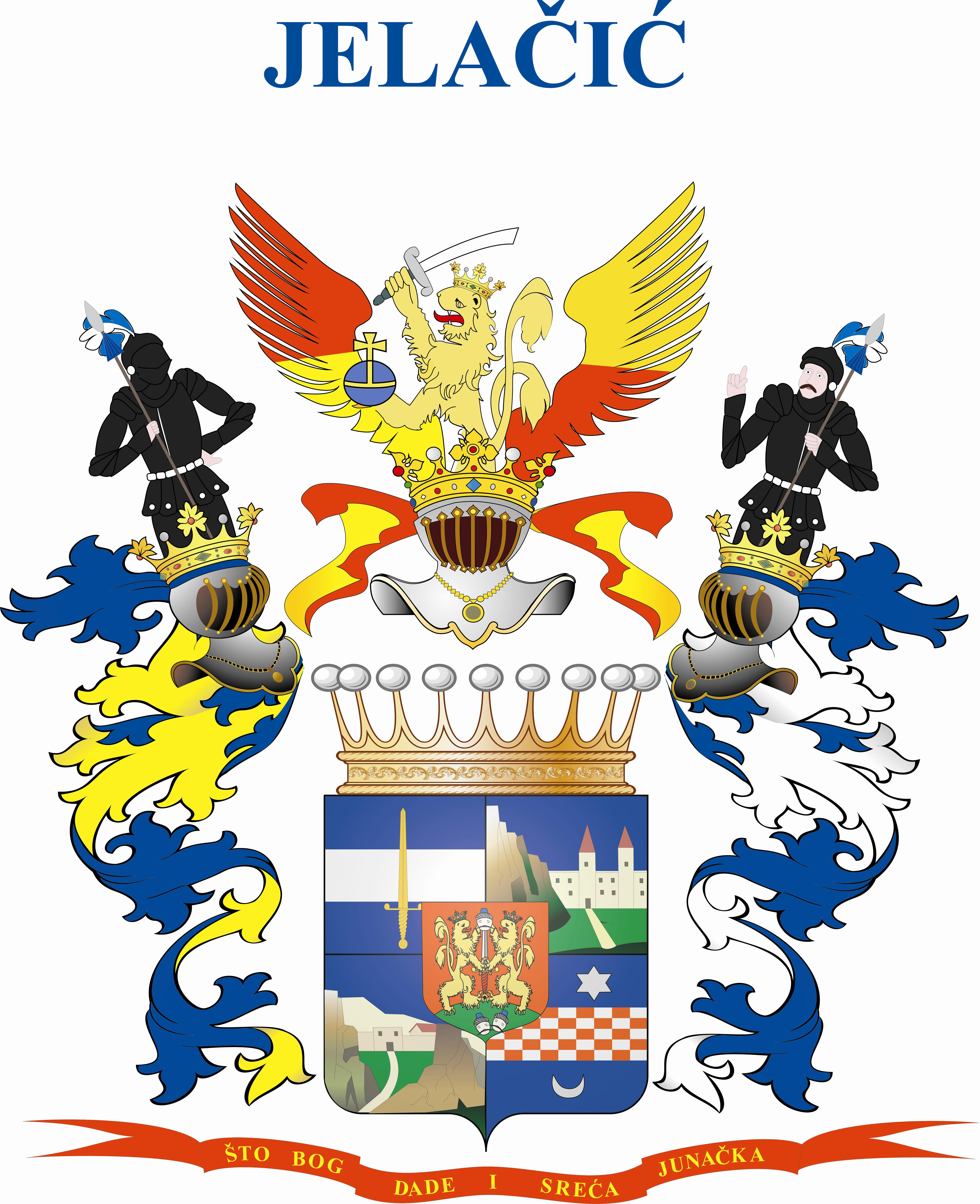 Grofovski grb Jelačića